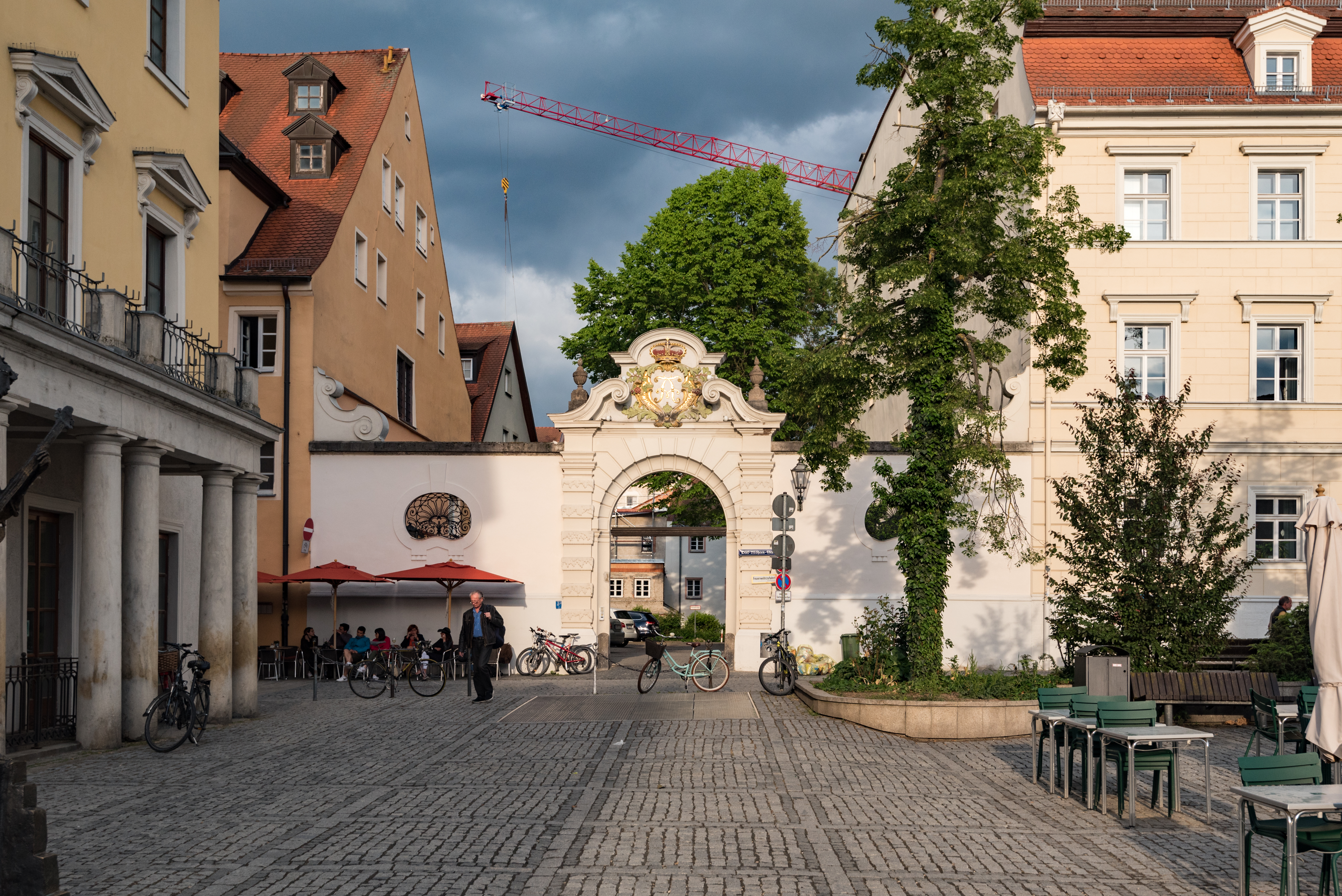 Regensburg, Bismarckplatz, Hofmauer